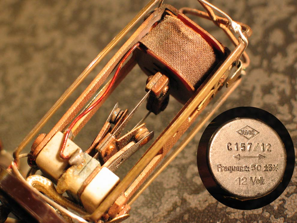 Mechanischer Kontakt eines elektromechanischen, historischen Zerhackers (Wechselrichter)